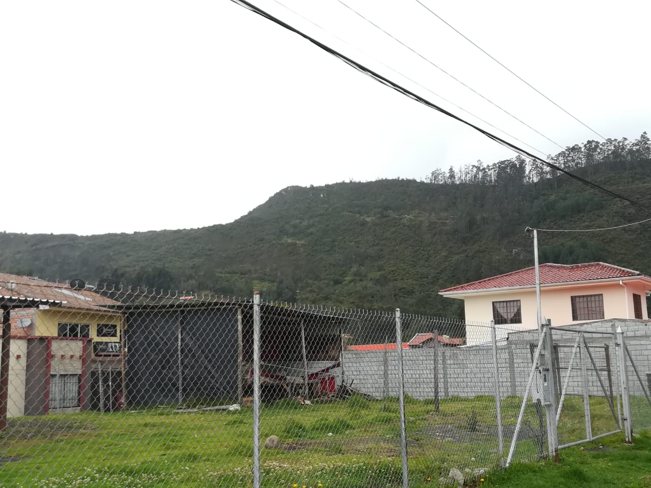 Este cerro tiene mucha historia y posee lugares arquelógicos muy caracteristicos de la parroquia de Paccha